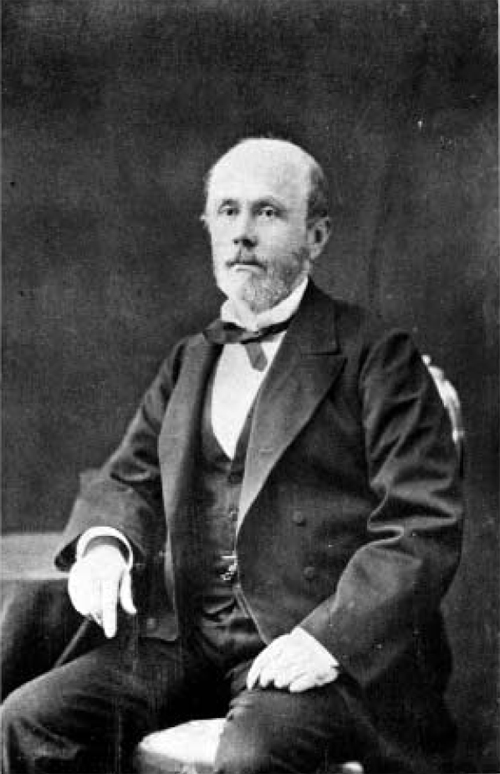 Aníbal Pinto Garmendia (Santiago; 15 de marzo de 1825 - † Valparaíso; 9 de junio de 1884) Abogado y político, Presidente de Chile.